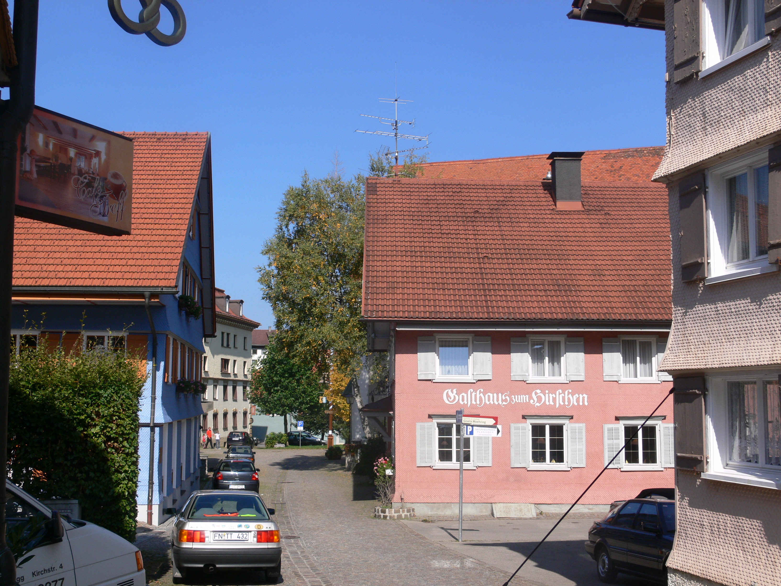 Kirchstraße in Scheidegg mit Gasthof Hirschen